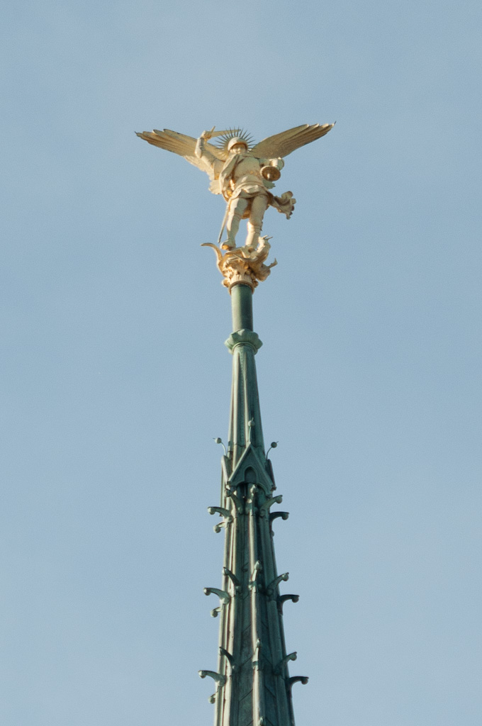 Statue de Saint-Michel sur la flèche de l'abbatiale du Mont-Saint-Michel .